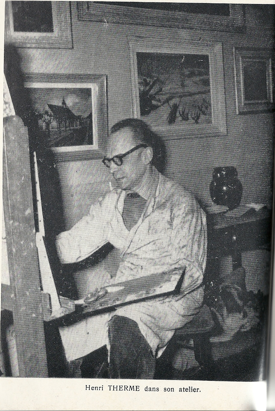 photographie prise dans son atelier au Mont St Sulpice par son épouse